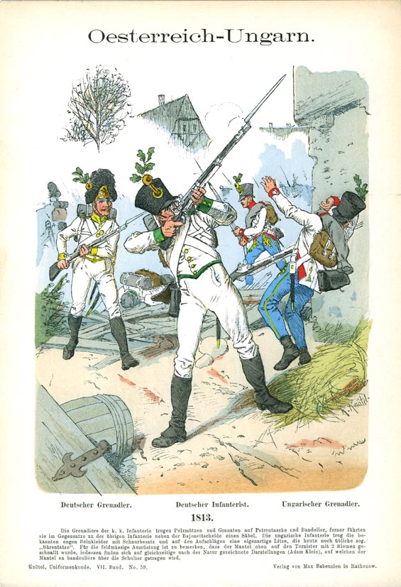 Иллюстрация Рихарда Кнотеля